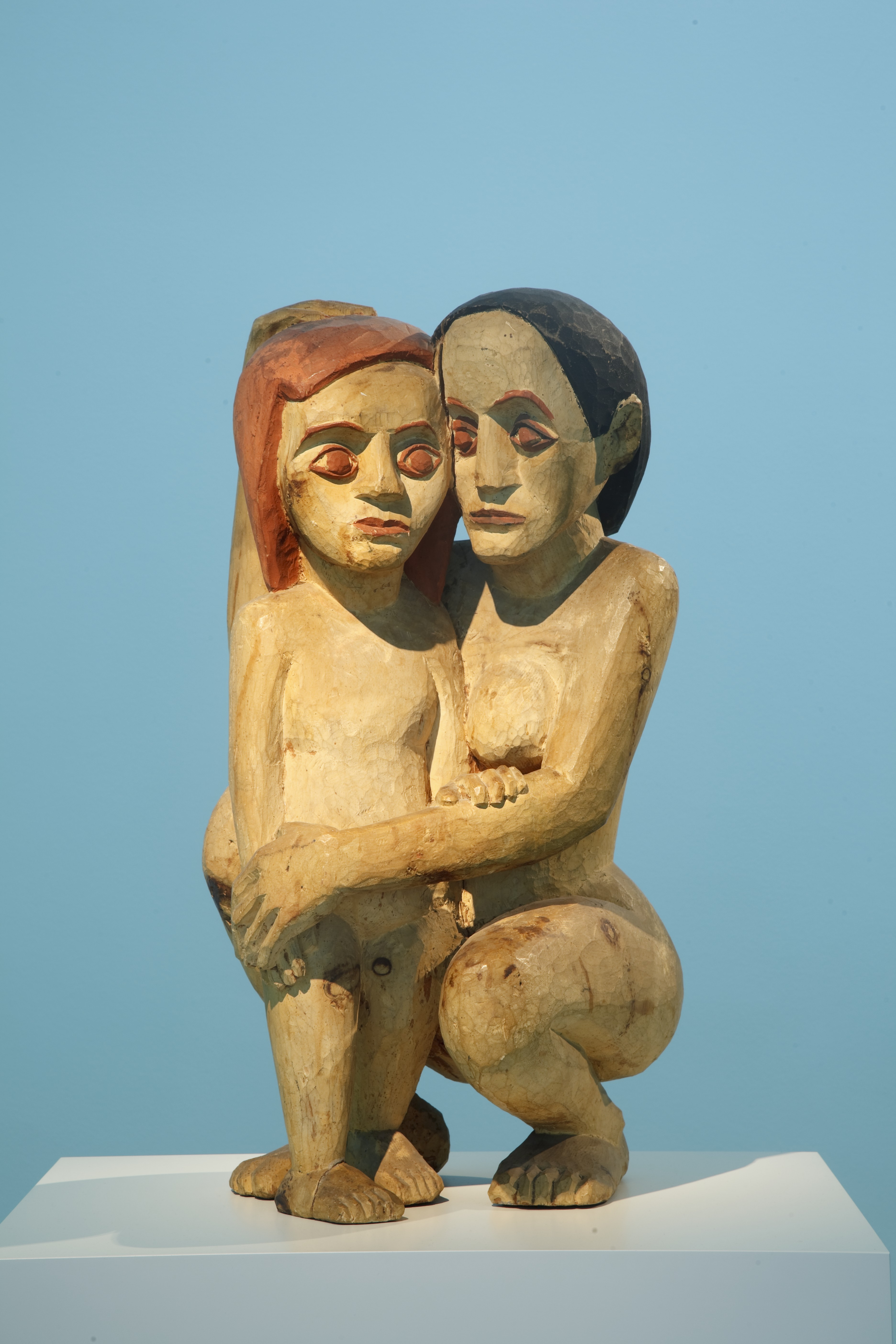 Hermann Scherer, Das kleine Mädchen, 1924/25, Arve bemalt, 76 x 38 x 40,5 cm, mpk, Skulpturensammlung. Foto: © mpk.